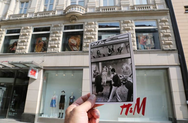 Fußgängerzone München